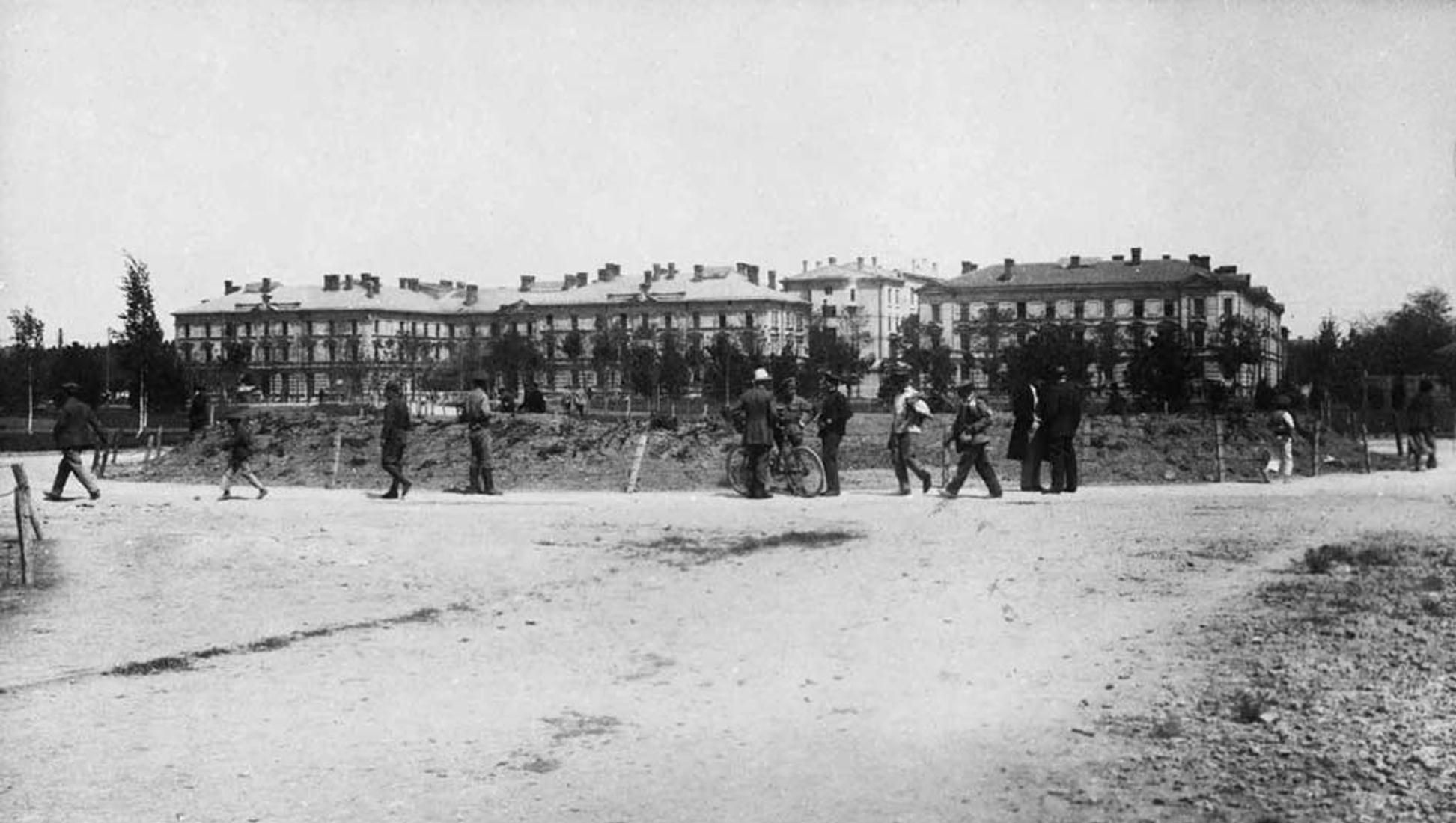 Будівля Павлівських дешевих квартир